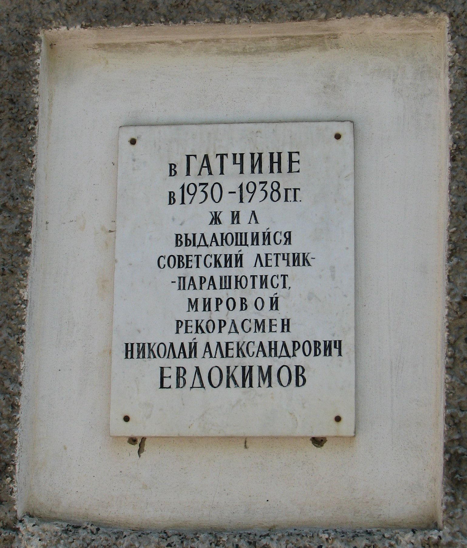 Мемориальная доска, посвящённая Николаю Александровичу Евдокимову. Улица Горького, 8/10, Гатчина